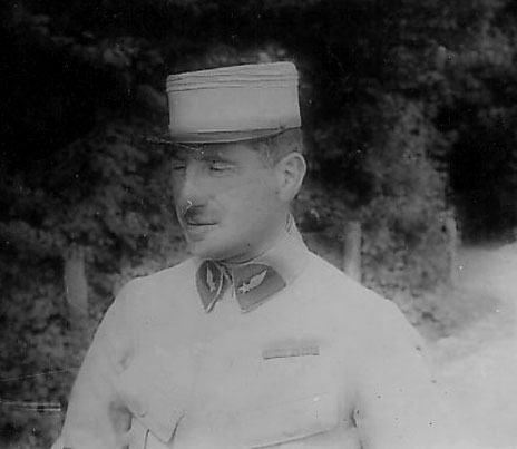 Retrat d'Henri Brocard (1845-1922), matemàtic francès